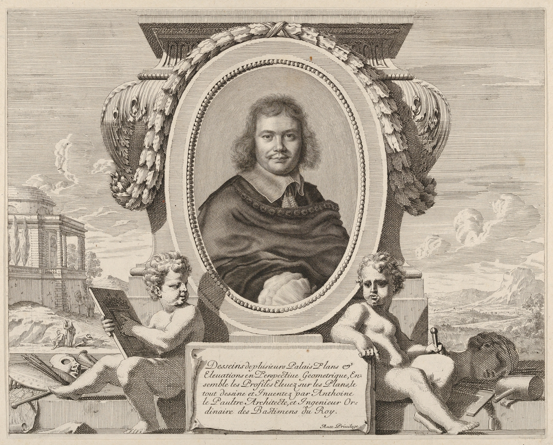 Antoine Lepautre, portrait gravé par Robert Nanteuil, décor par Jean Lepautre. 25,2 x 35,8 cm. Harris Brisbane Dick Fund, 1953, MET New York, N°53.600.27